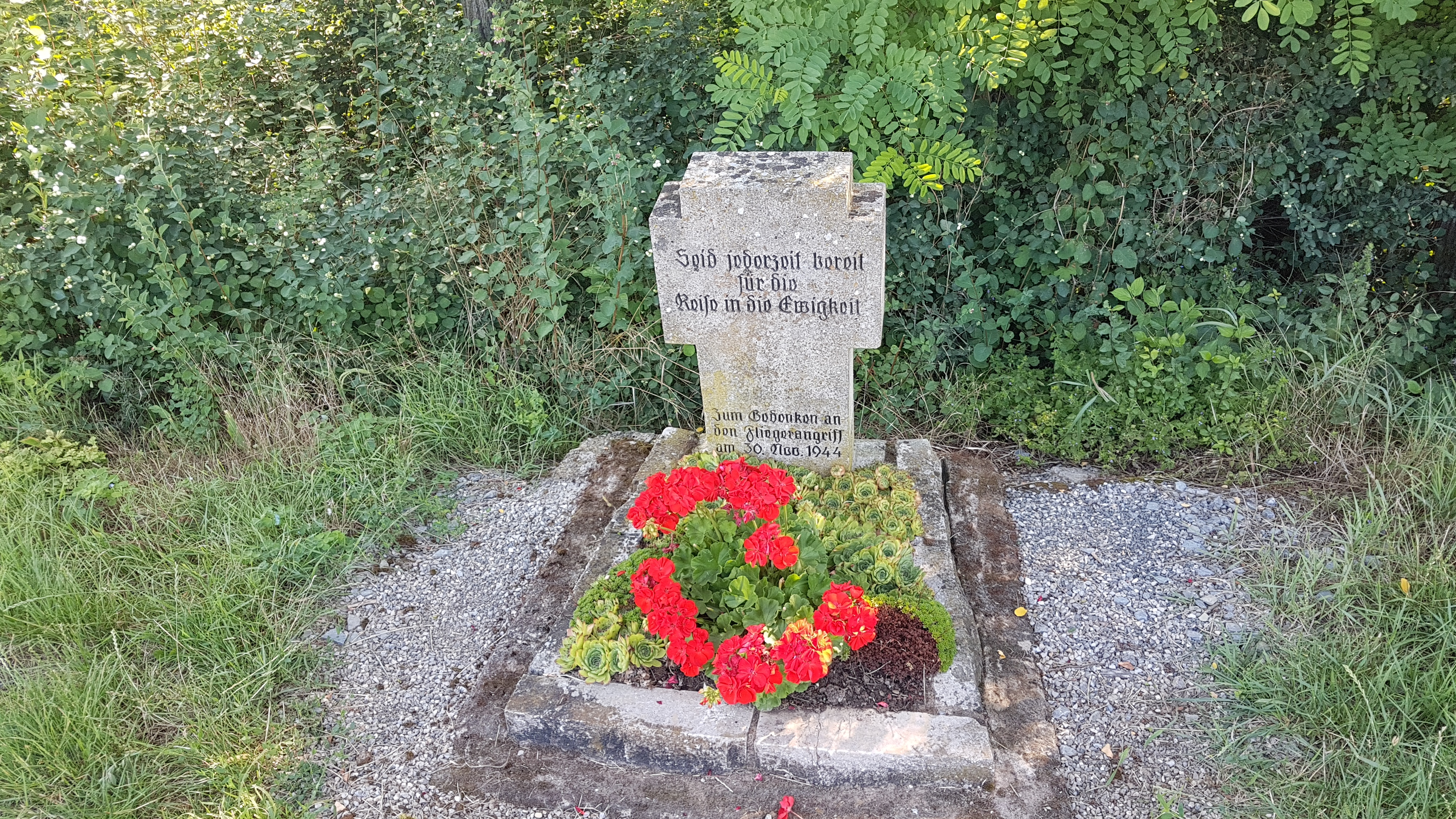 Am Taubertalradweg von Distelhausen nach Lauda, kurz vor Lauda.